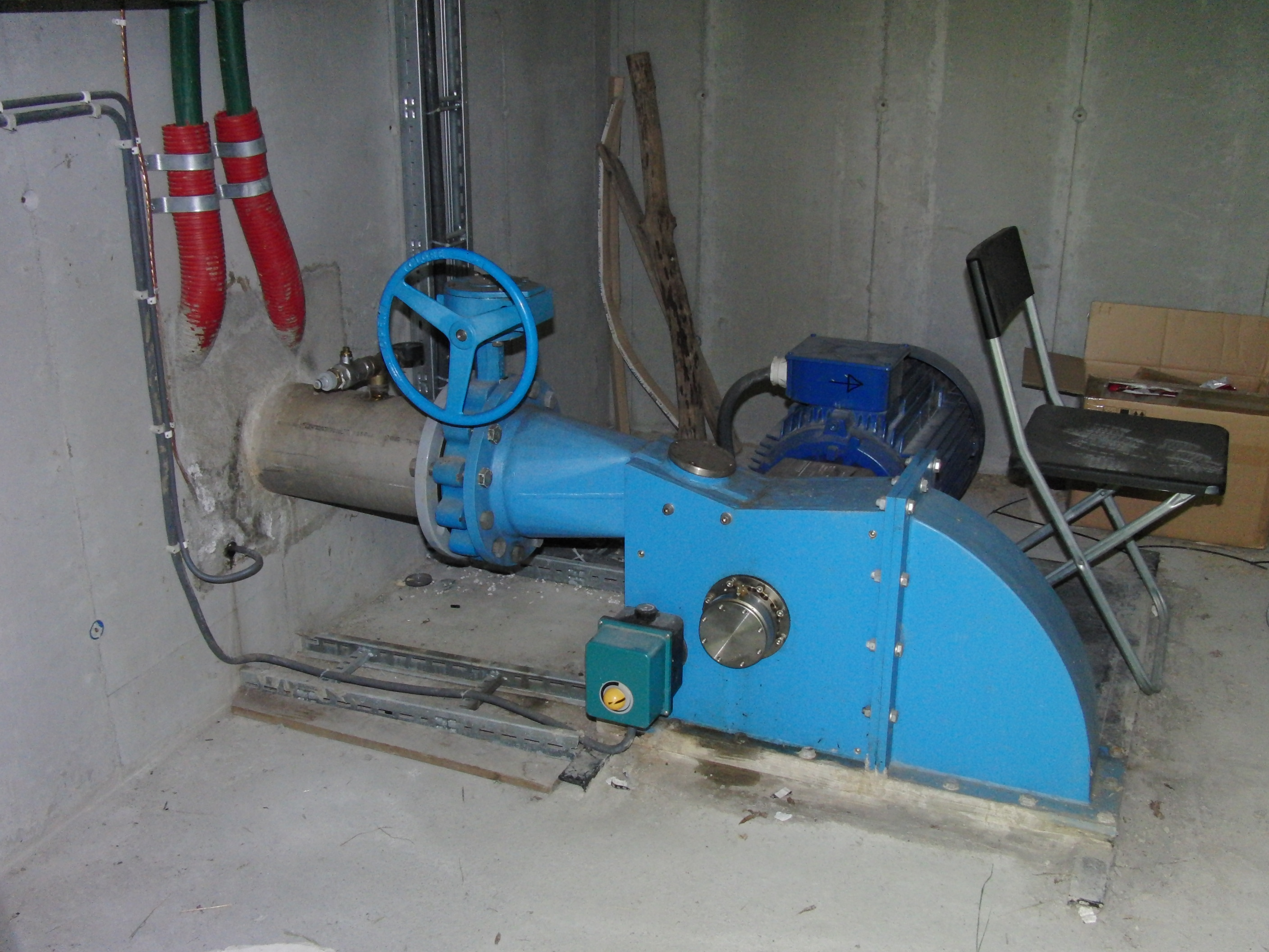 Turbin Fuglestein kraftverk